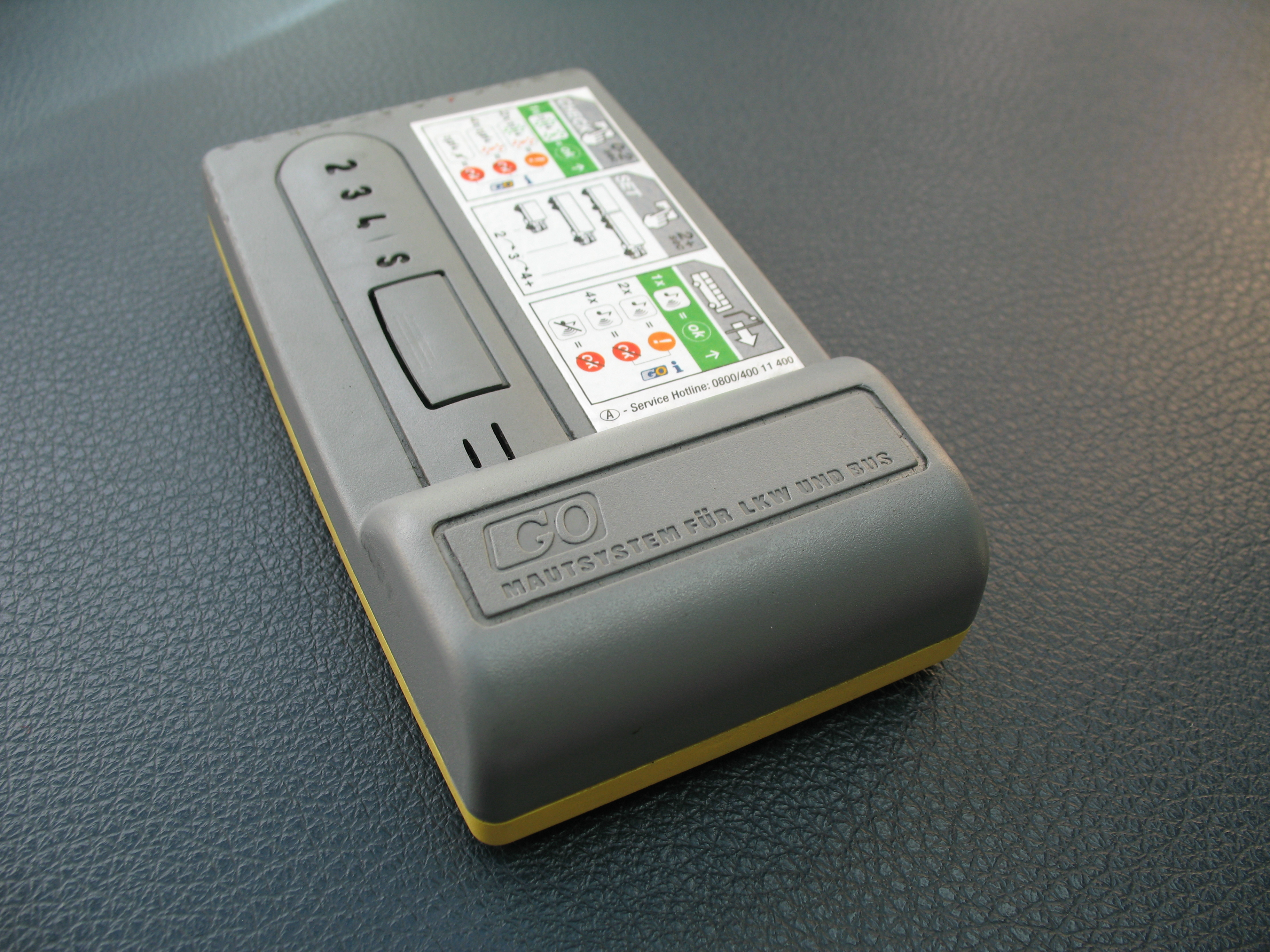 Terminal GO-Box pour les poids-lourds empruntant les autoroutes en Autriche.